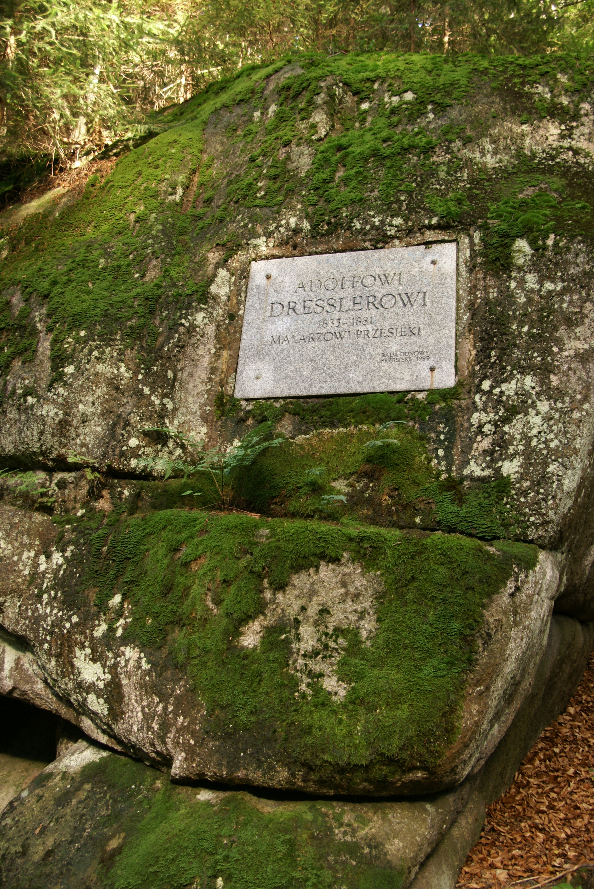 Tablica pamięci Adolfa Dresslera we wsi Przesieka, powiat jeleniogórski.